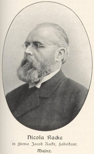 Nicola Racke, Deutscher Reichstags- und Hessischer Landtagsabgeordneter (Zentrum), Fabrikant in Mainz